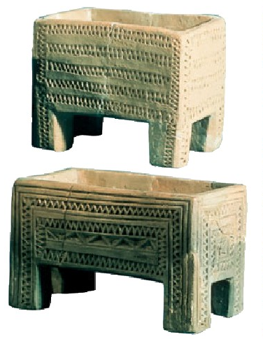 La Hoyako zeramikazko kutxak. Gasteizko Arkeologia Museoa